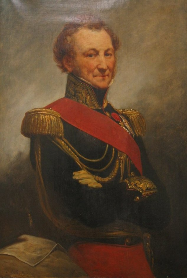 Le Général Marie Etienne François Henri Baudrand